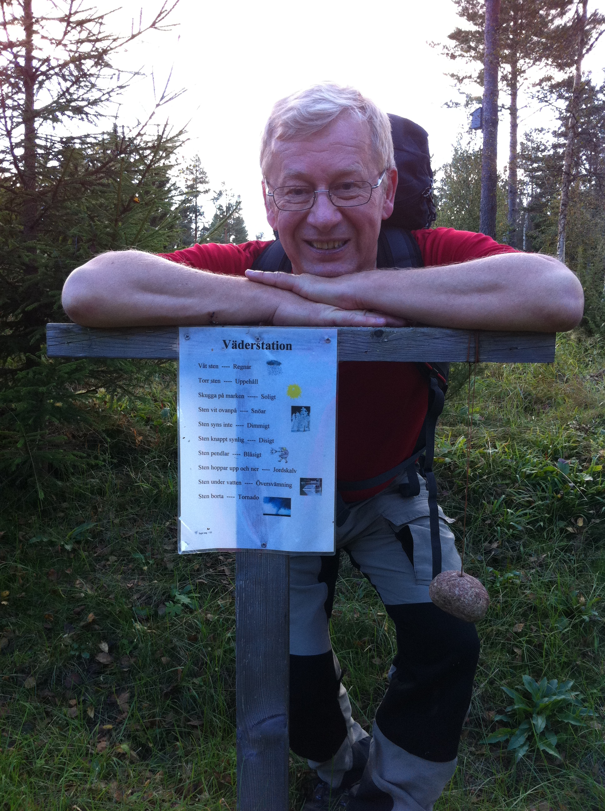 Jan O Jansson, Vandring längs vasaloppsleden 2011